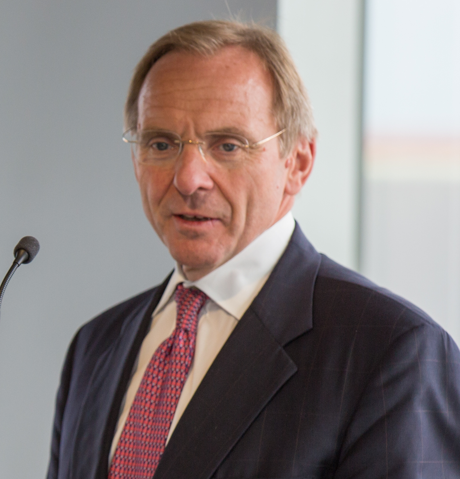 John Manzoni, Open Procurement Event